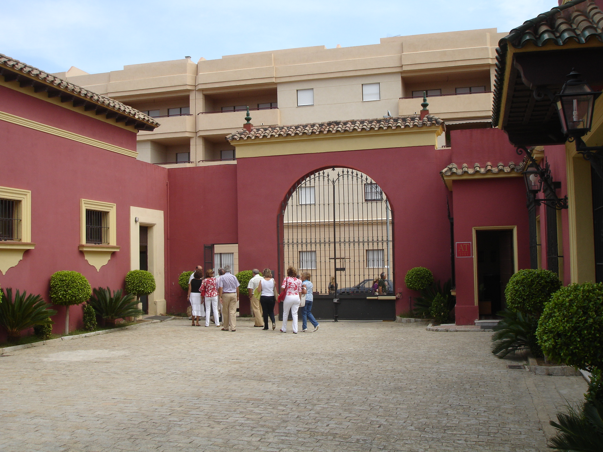 Valdivia in Jerez, Andalusia (Spain)